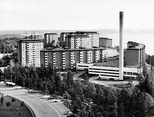 Larsbergs bostadsområde 1967 med vy mot öster. Höghusen längst bort på bilden är inte helt färdigställda.